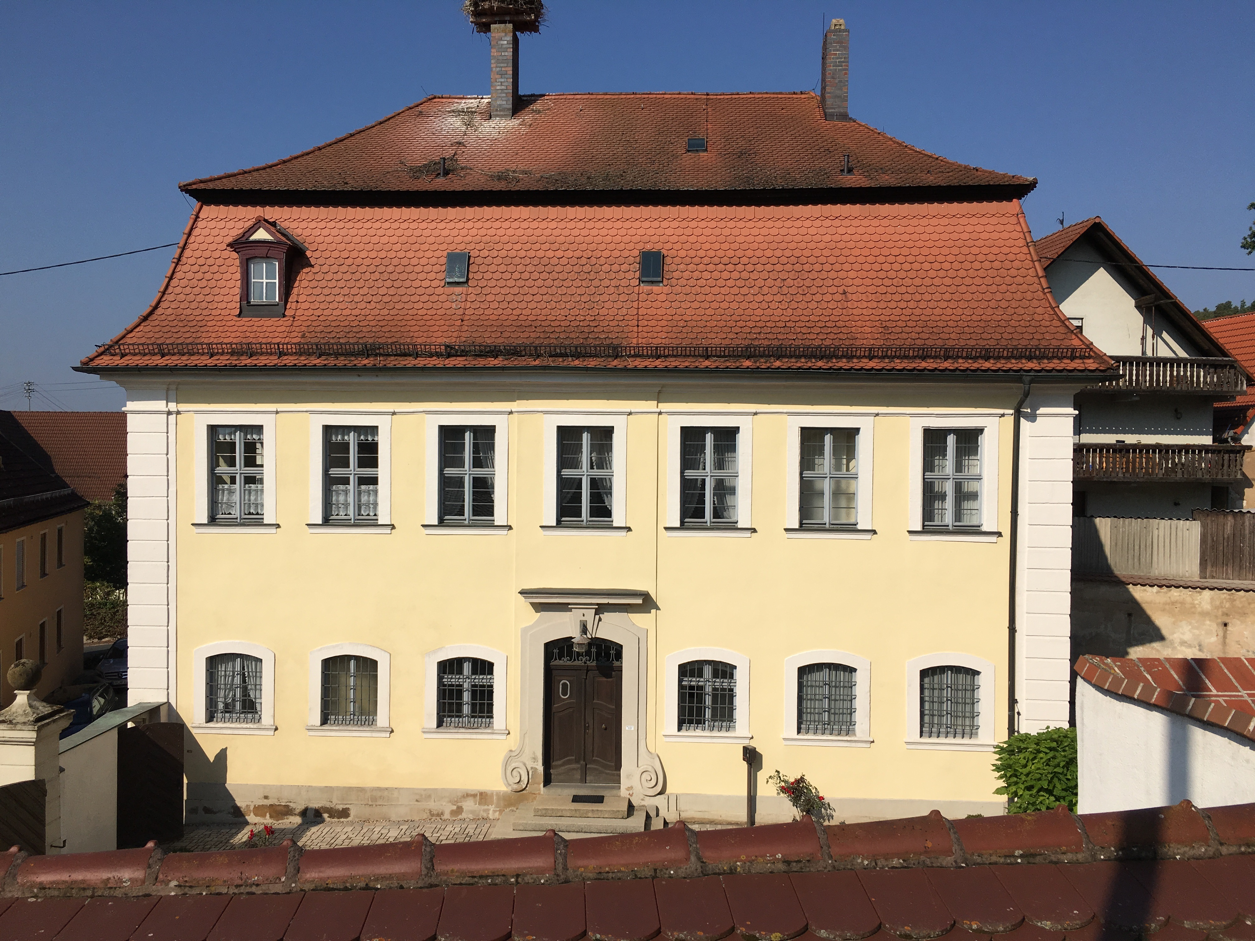 Zentbechhofen Pfarrer-Reichelt-Platz 1 Amtshaus